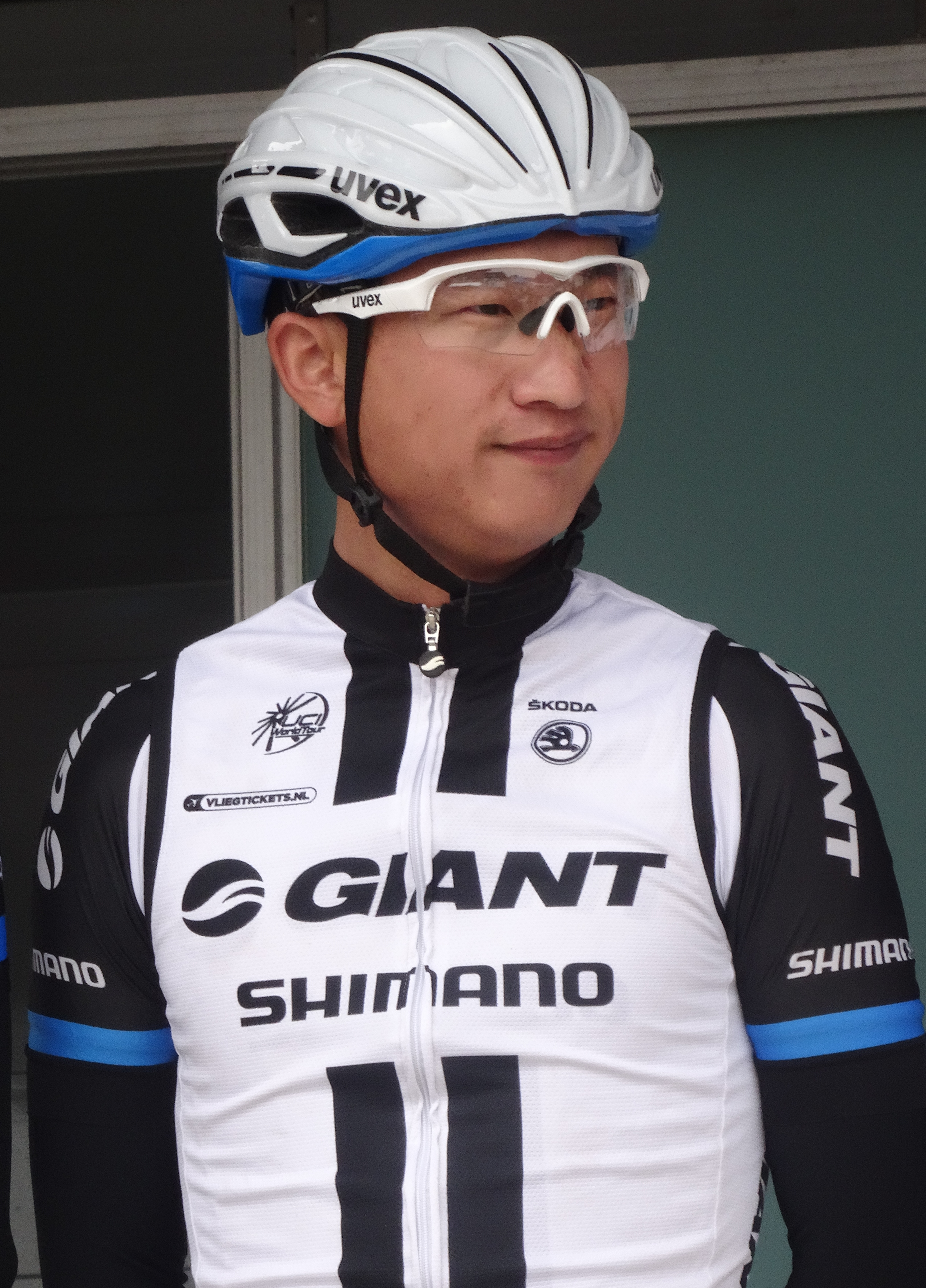 Reportage photographique réalisé le mercredi 24 septembre à l'occasion du départ et du début de la course du Circuit du Houtland 2014 à Lichtervelde, Belgique.